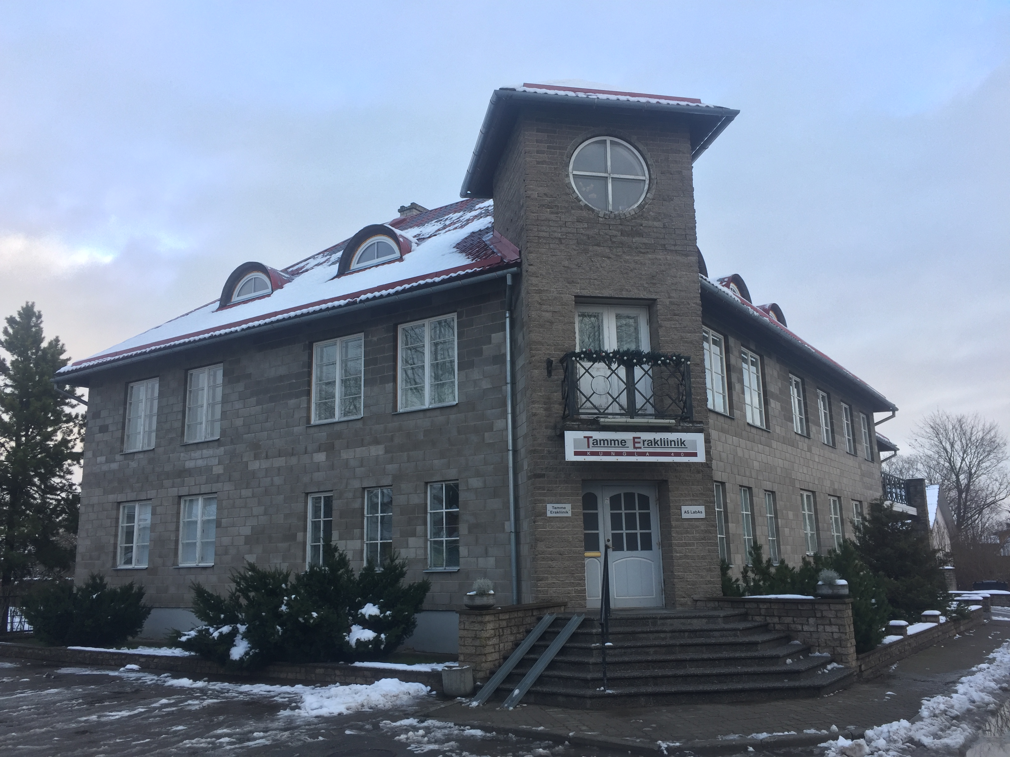 Tamme erakliinik (2017)